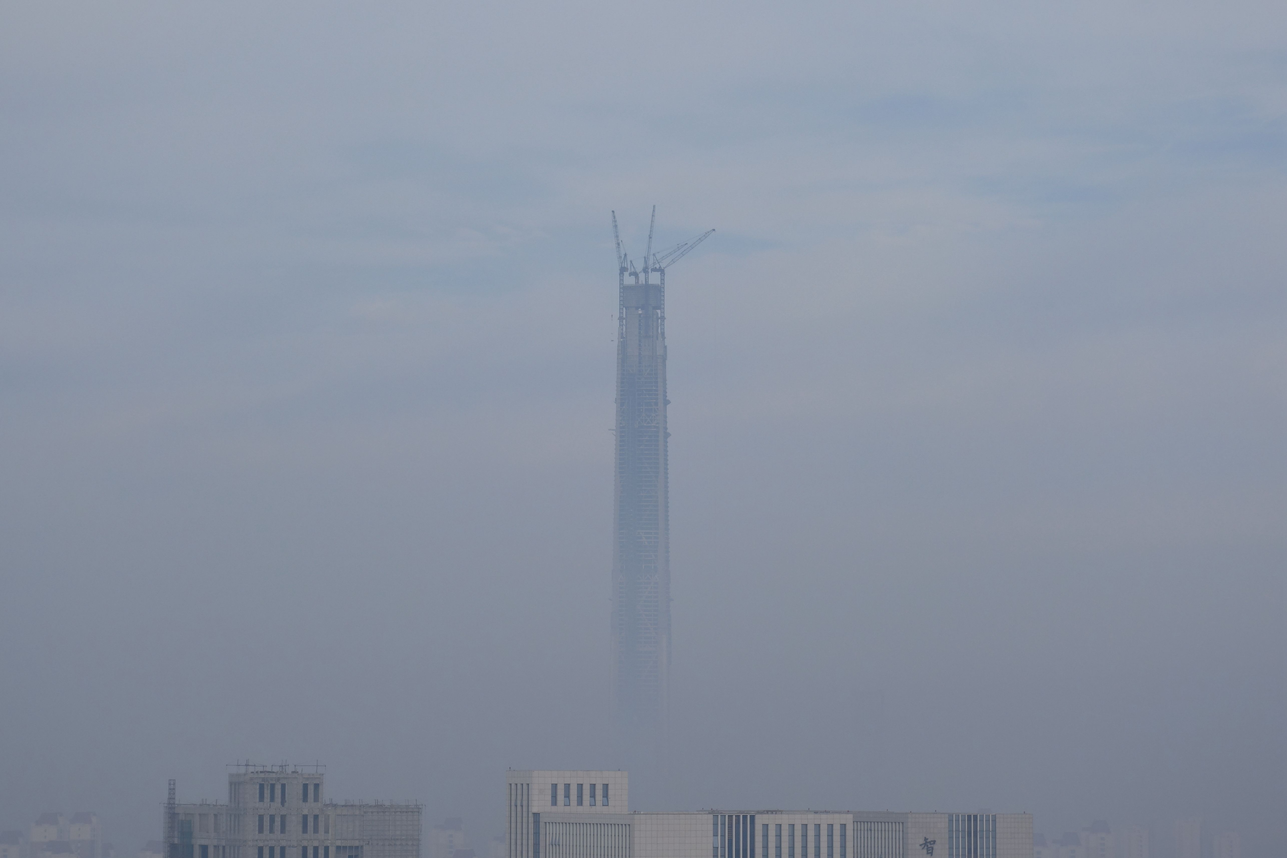 雾霭中建设中的高银金融117大厦